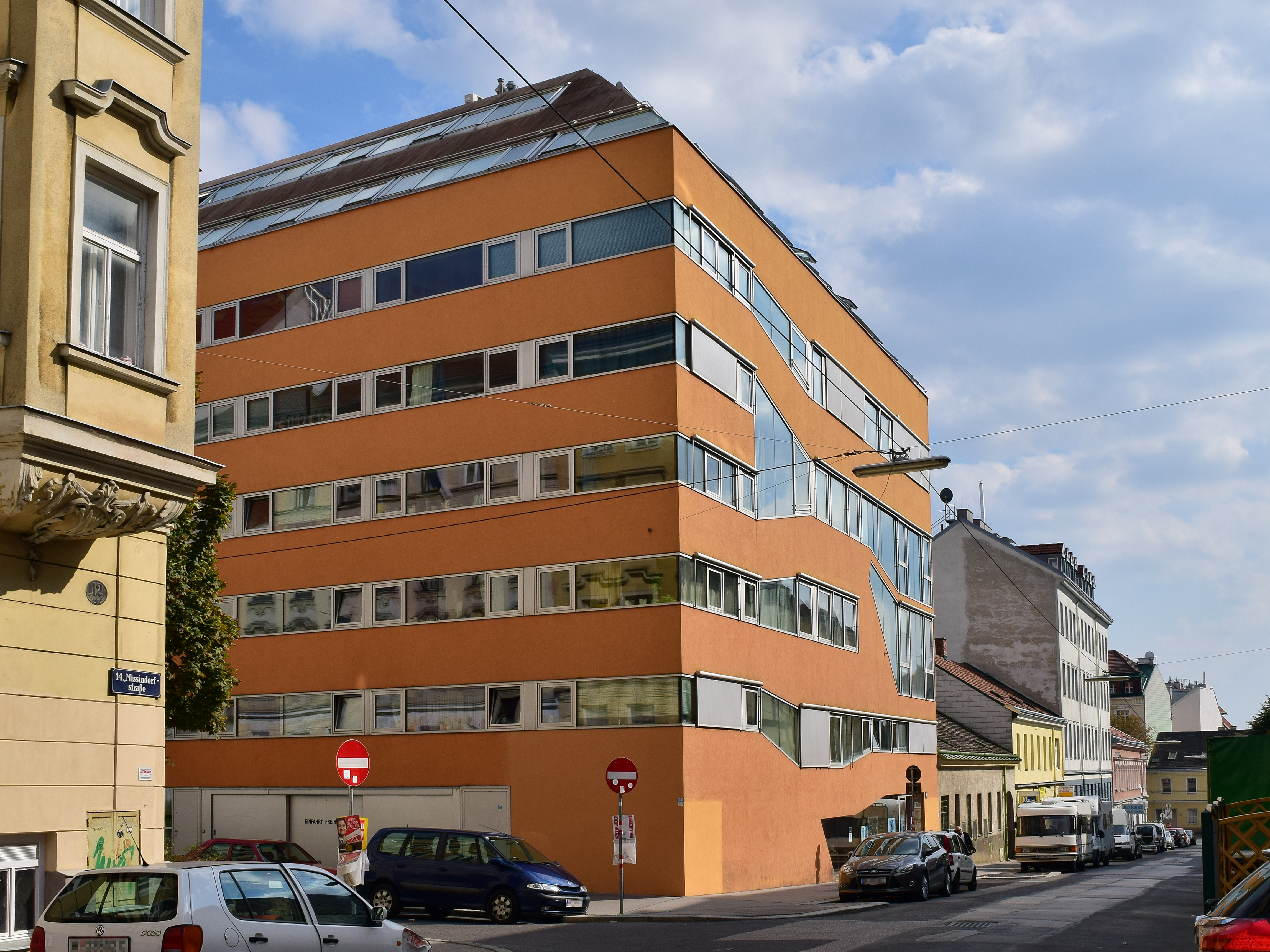 In der ehemaligen Sargfabrik in Wien-Penzing verwirklichte der Verein für Integrative Lebensgestaltung im Jahr 1996 ein Wohn- und Kulturprojekt. Darin befinden sich neben Wohnungen ein Kulturhaus, ein Badehaus, ein Seminarraum, ein Kinderhaus und ein Café-Restaurant. Die Miss Sargfabrik ist eine Erweiterung des Projektes in der Missindorfstraße (daher der Name). Näheres in diesem PDF.